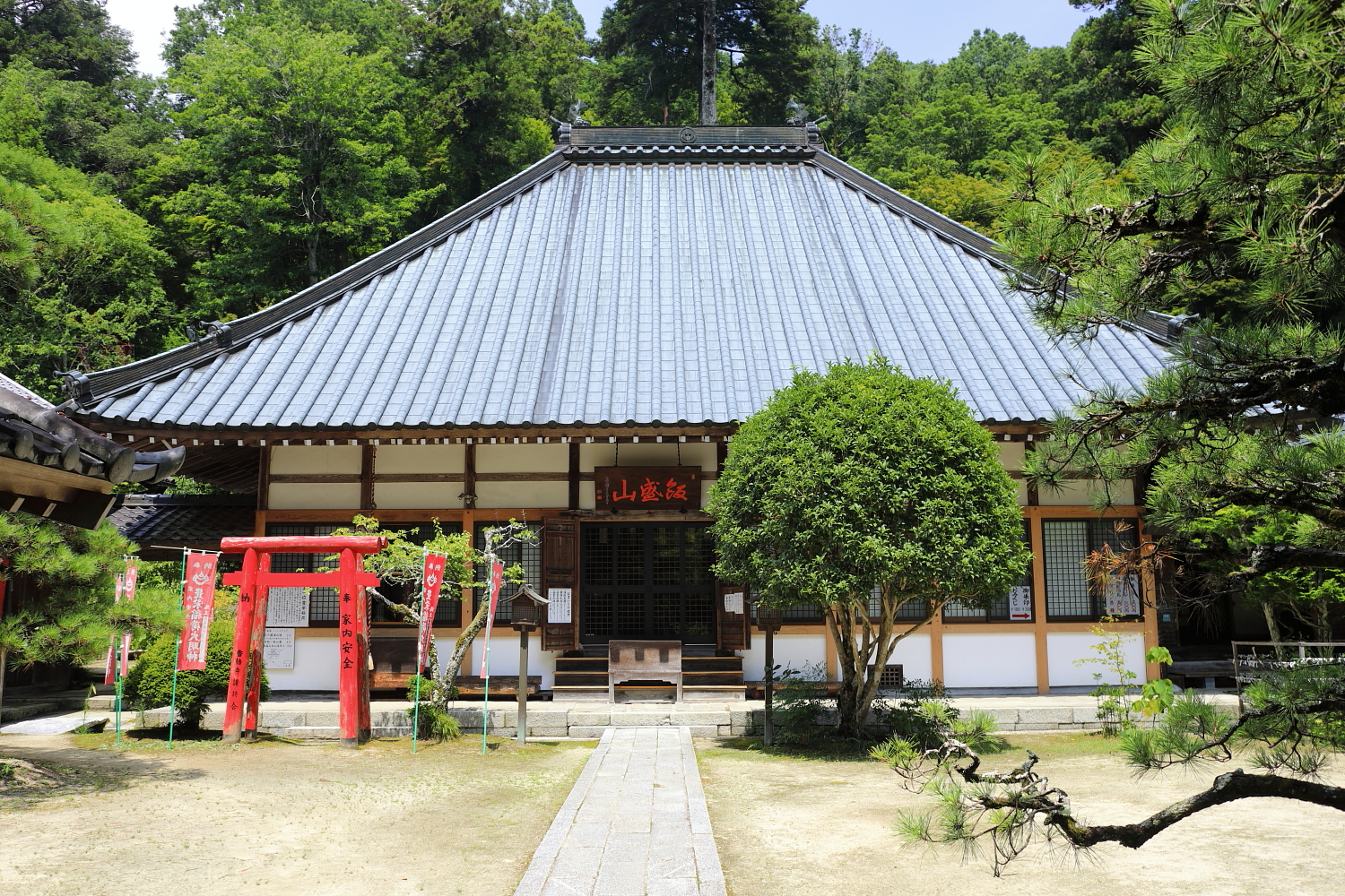 香積寺本堂（豊田市足助町、2019年（令和元年）8月）